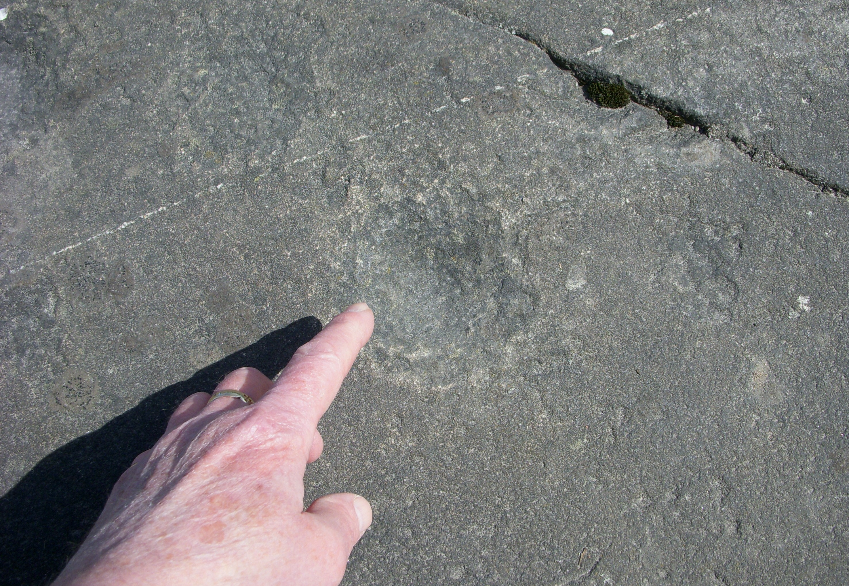 En av 13 skålgropar i Högalidparken i Stockholm